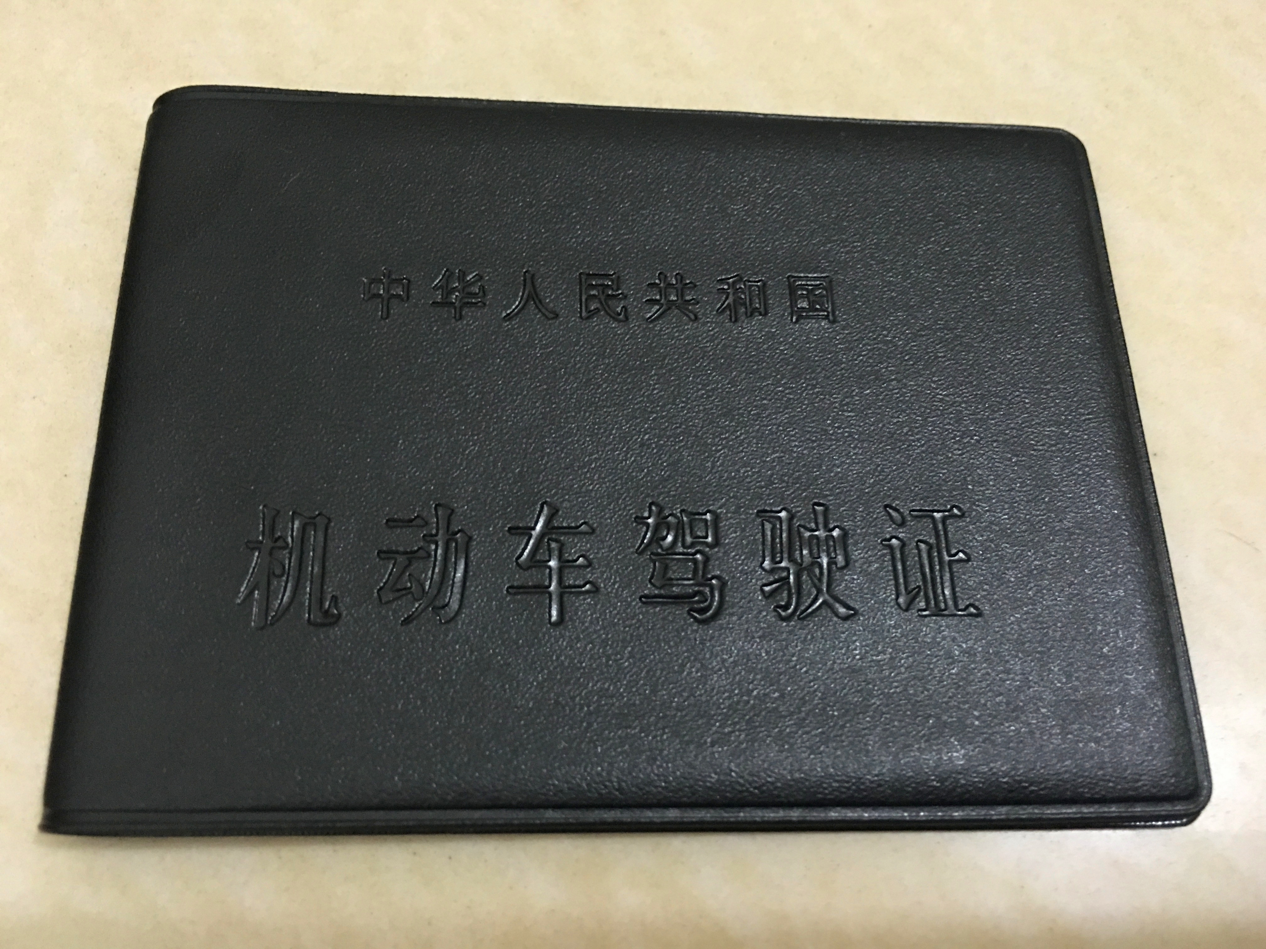 中文（中国大陆）: 中华人民共和国机动车驾驶证封面